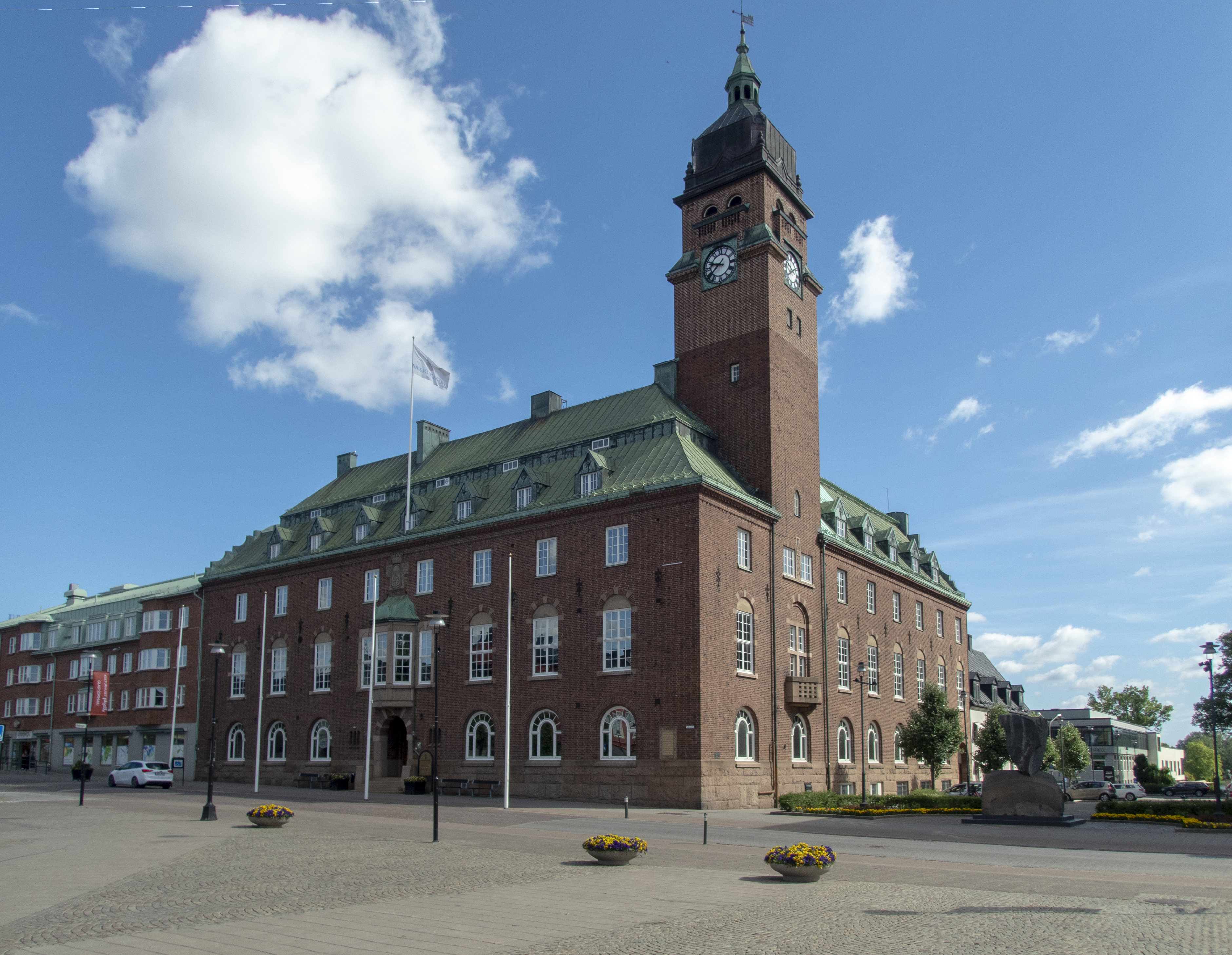 Nässjö stadshus uppfördes 1913-15 efter ritningar av arkitektfirman Ewe & Melin i Malmö